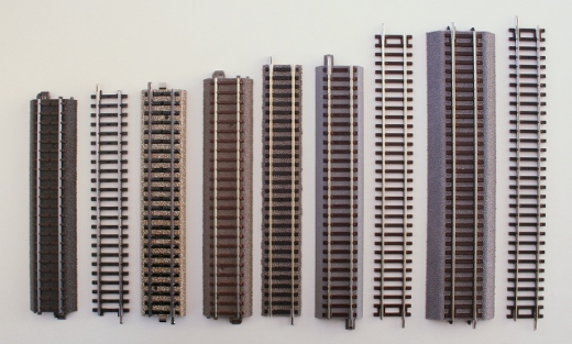 De mest udbredte modeljernbanespor i Danmark. Fra venstre er det Märklins C-spor, K-spor og M-spor, dernæst Trix’ C-spor, Fleischmanns spor med ballast, Rocos GEOline, Rocoline uden ballast, Rocoline med ballast og endelig Pikos spor.